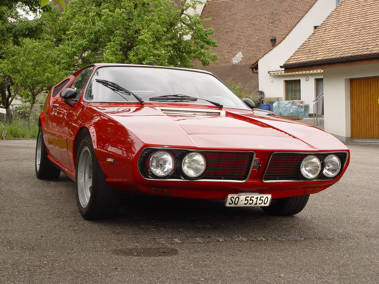 Albar Jet